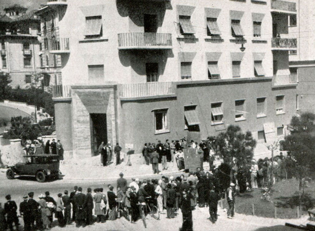 Ballerine regia G.Machaty, prod A.F.I. Tirrenia Riprese degli esterni a Roma, quartiere Flaminio marzo 1936